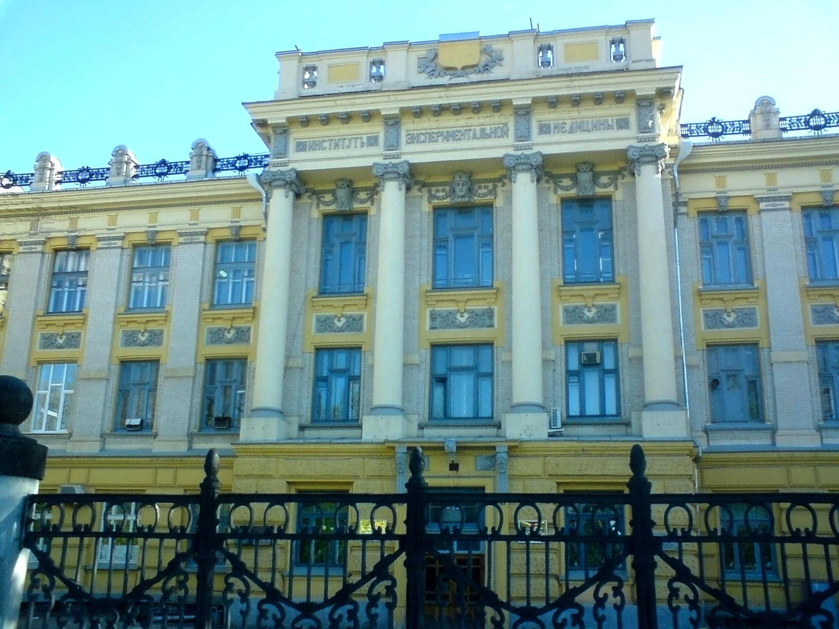 Саратовский государственный медицинский университет (учебный корпус по Московской, бывший 2-й корпус СГУ